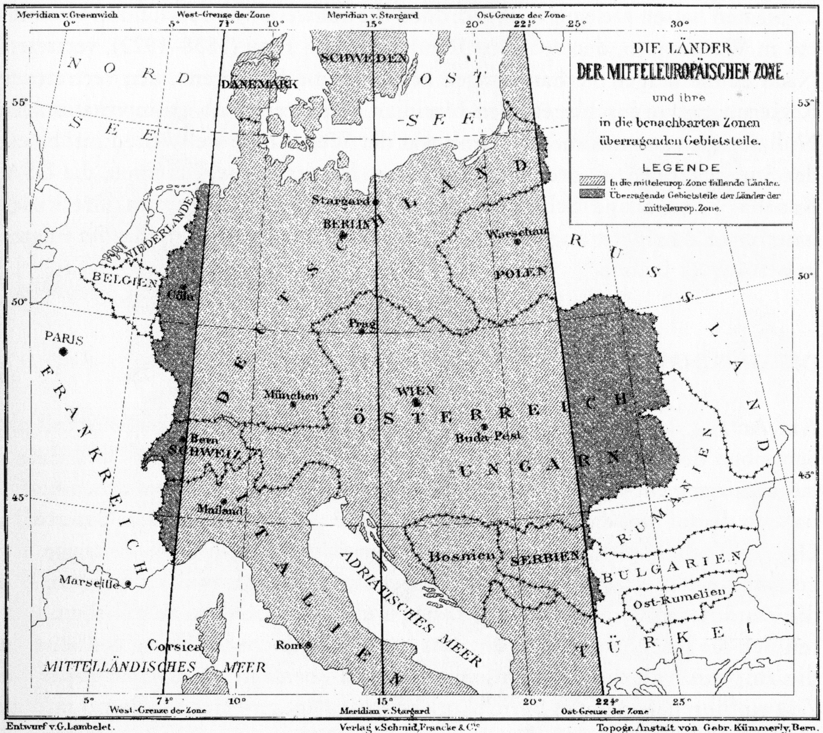 Europäische Länder, für die die MEZ-Zeitzone passend ist